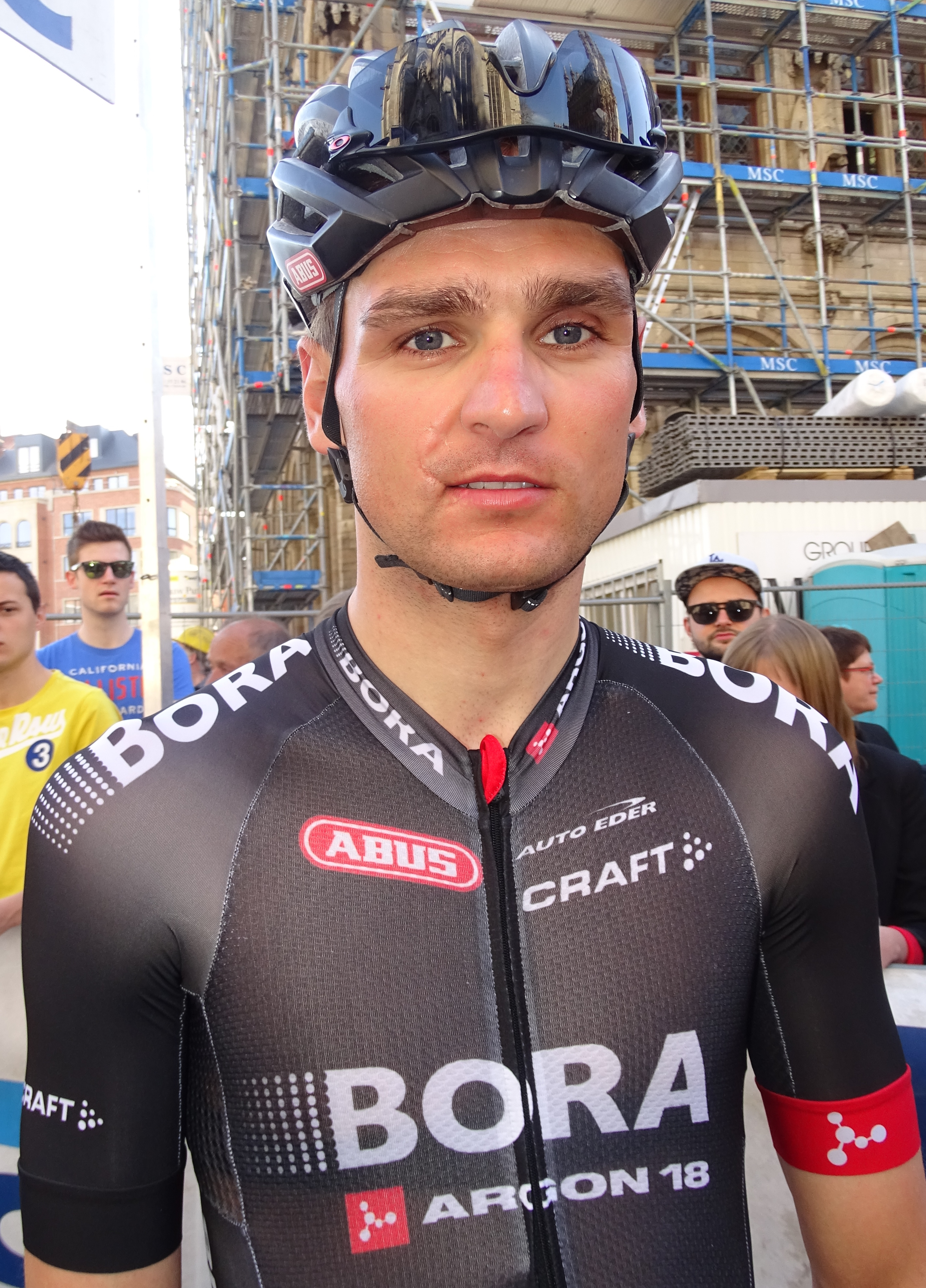 Reportage réalisé le mercredi 15 avril à l'occasion du départ de la Flèche brabançonne 2015 à Louvain, Belgique.